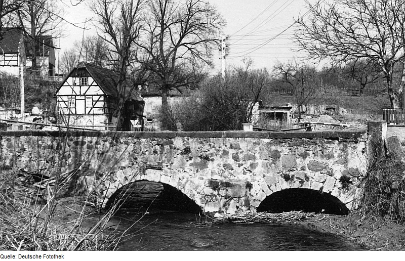 Original image description from the Deutsche FotothekTriebischtal-Taubenheim. Alte Brücke, im Hintergrund das Gelände der ehem. Niedermühle